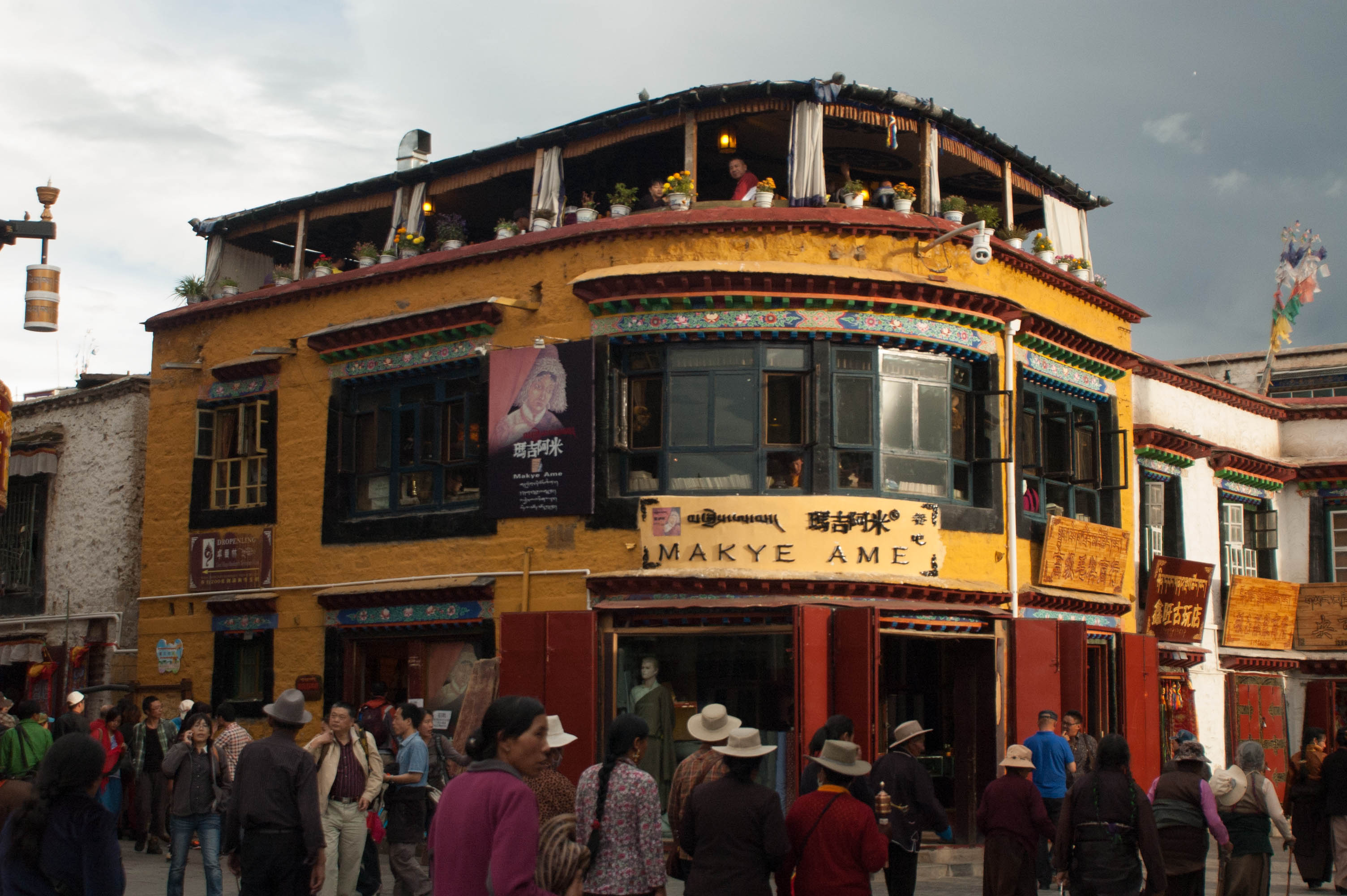 201308玛吉阿米